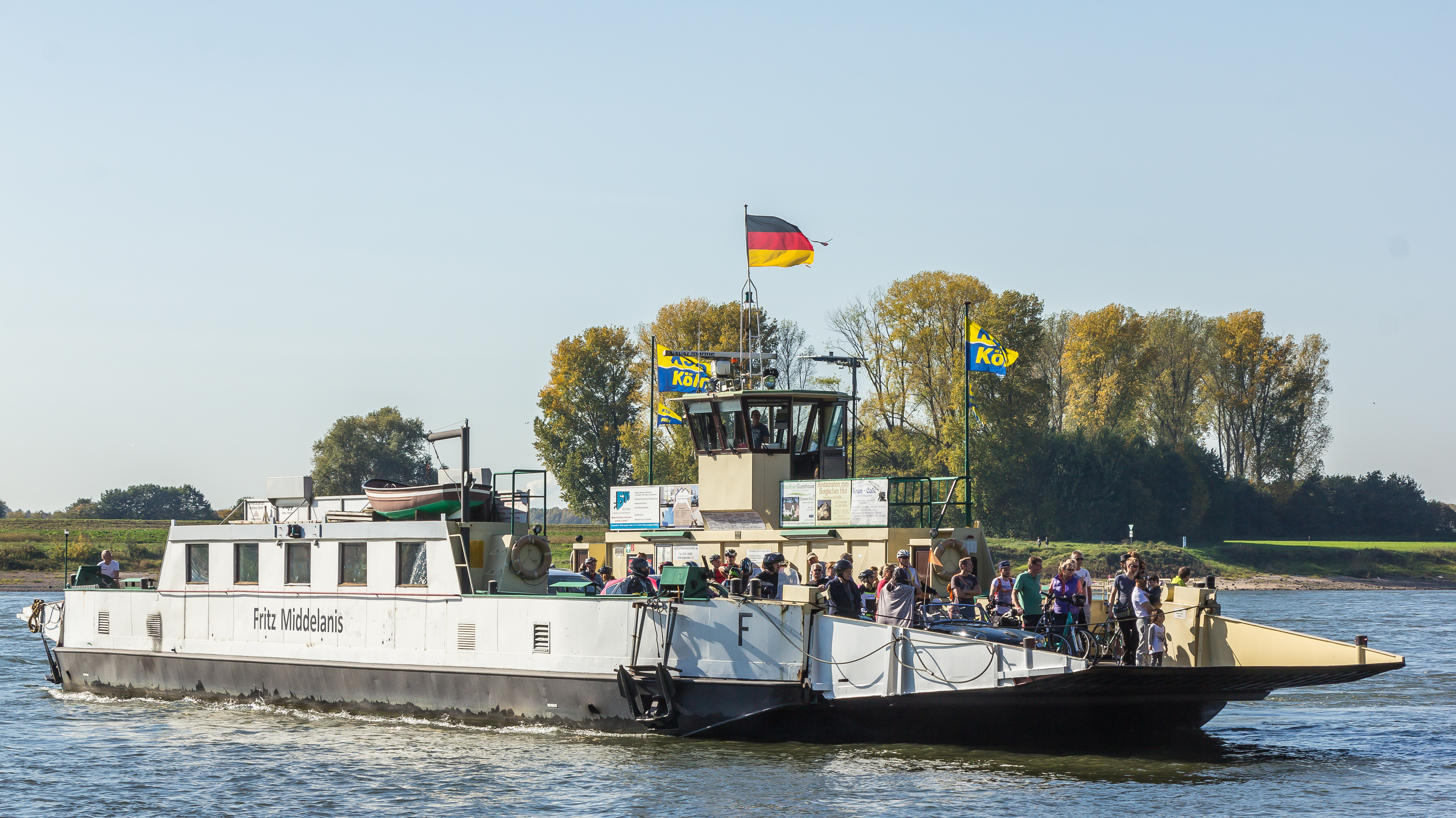 Autofähre „Fritz Middelanis“ (ENI 04810070) Langel (Köln-Merkenich) - Leverkusen-Hitdorf am Anleger in Hitdorf